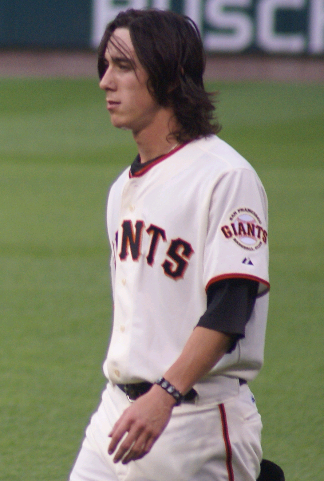 Tim Lincecum